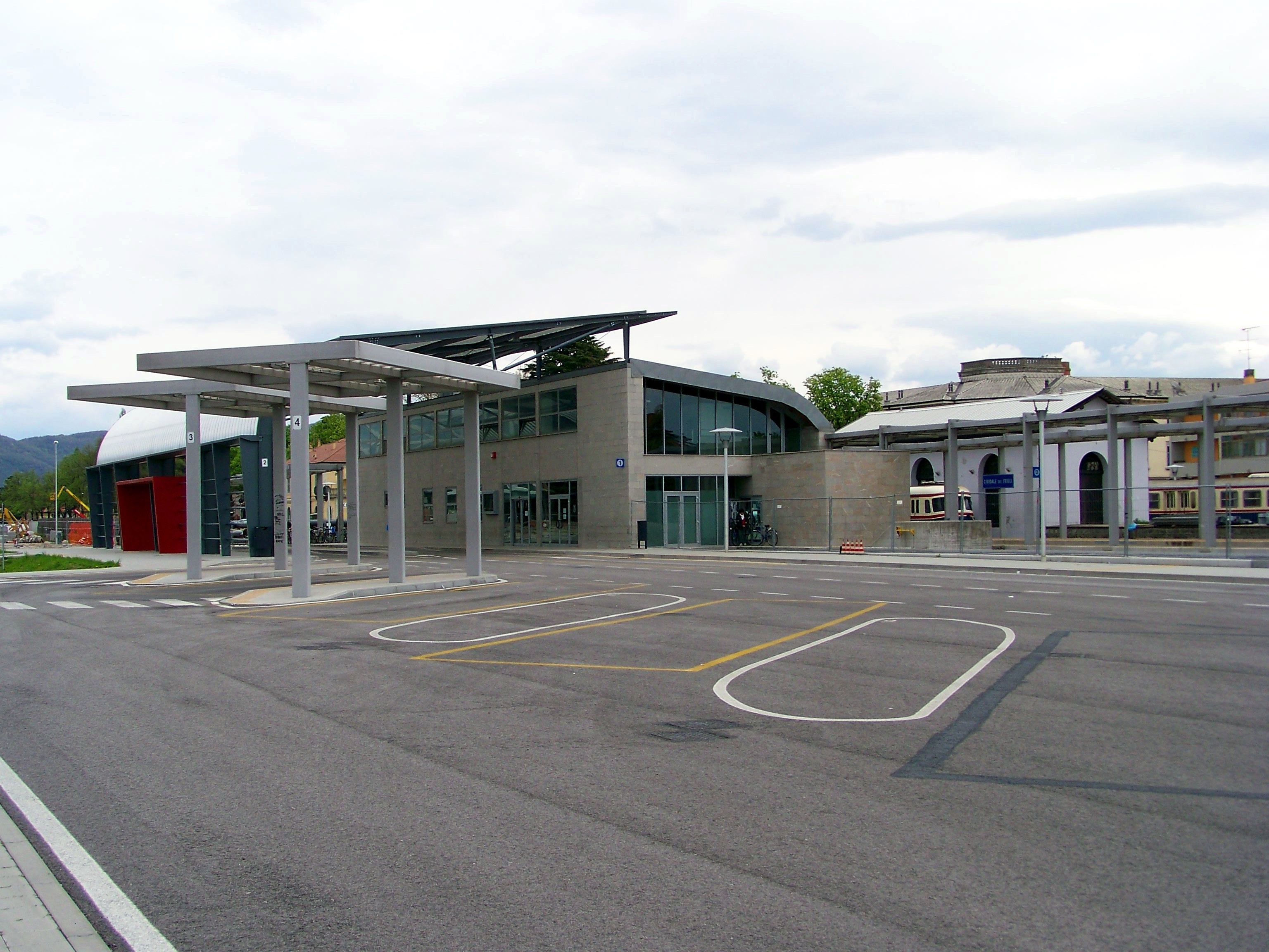 La nuova stazione di Cividale del Friuli e l'autostazione, aperte nel 2008